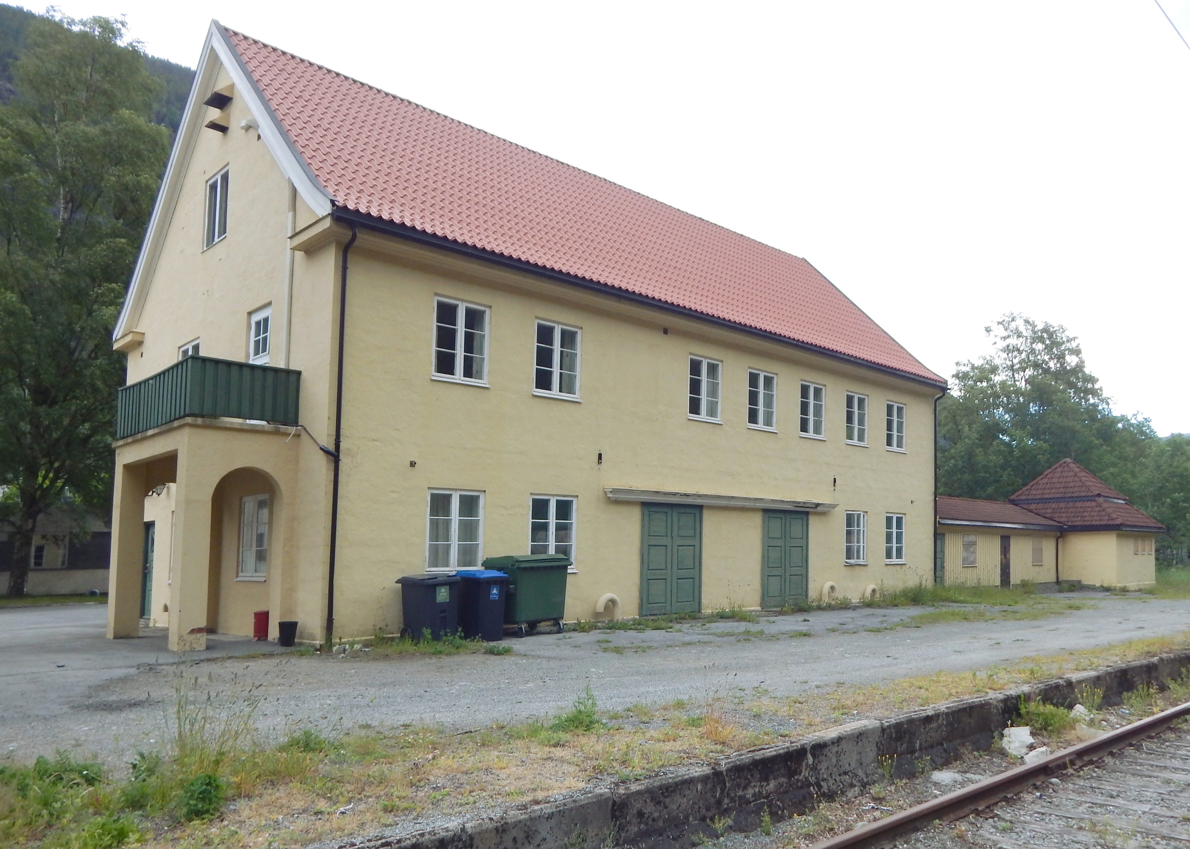 Ingolfsland stasjon på Rjukanbanen